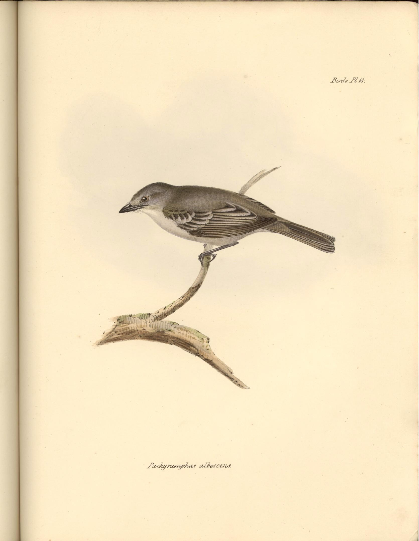 Pachyramphus albescens (= Suiriri s. suiriri)